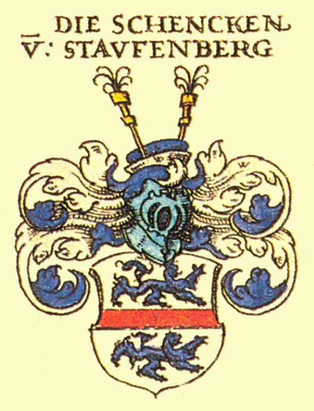 Wappen der Schwäbischen Adelsfamilie Schenk von Stauffenberg